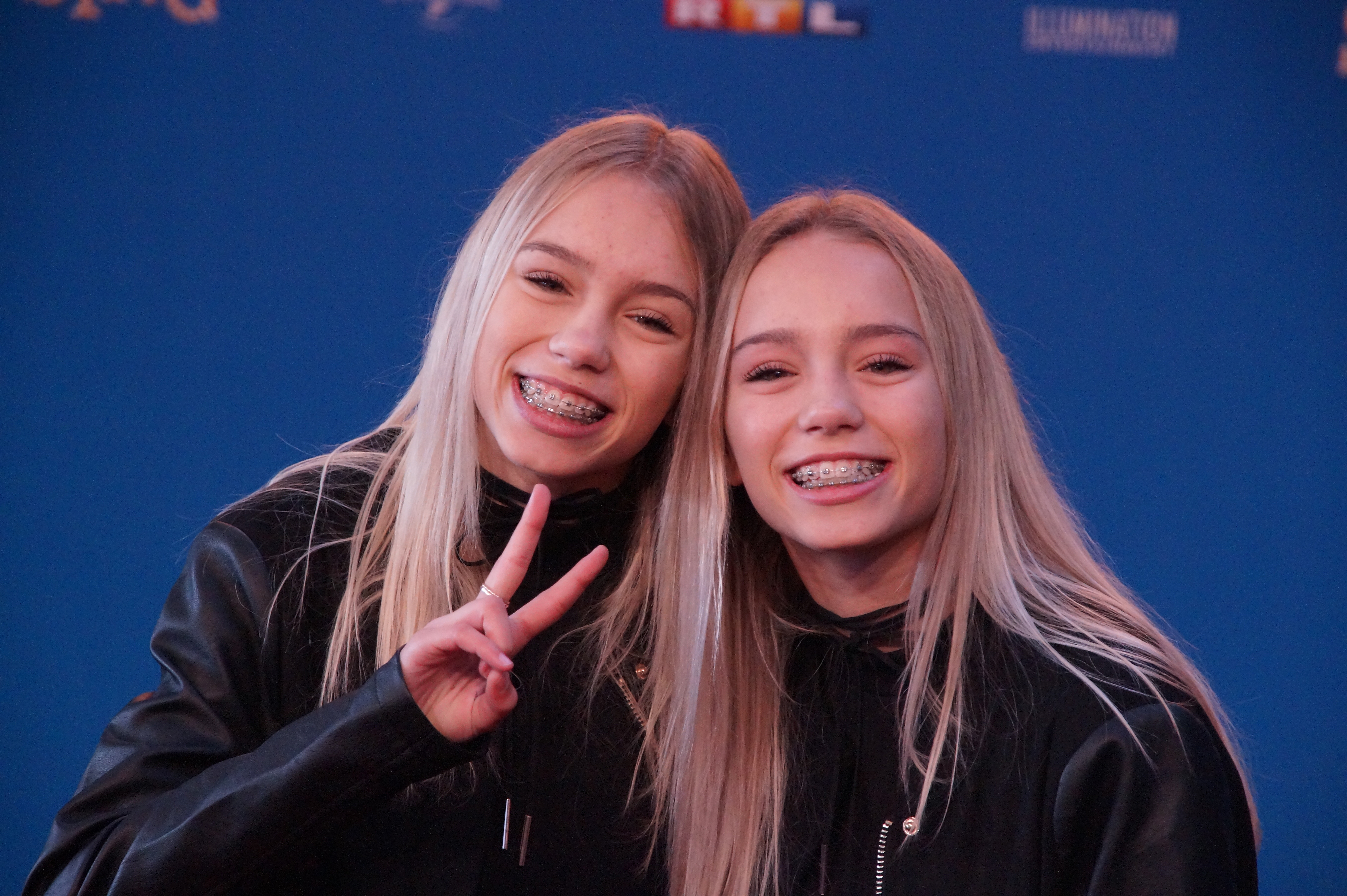 Lena & Lisa bei der Europa-Premiere von dem neuen Animationsfilm "SING", am 27.11.2016 im Kölner Cinedom.